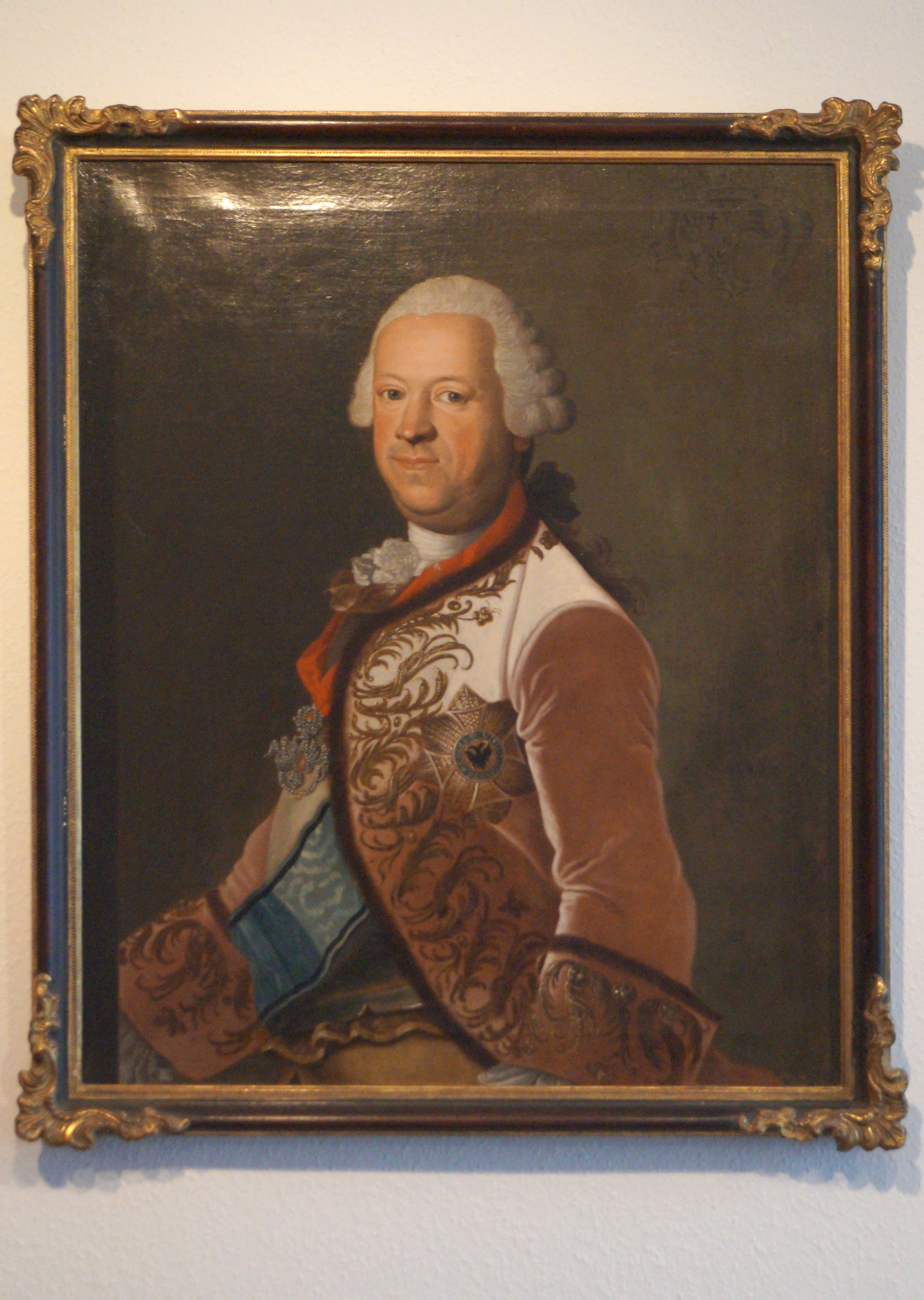 Portraits Friedberger Burggrafen im Wetterau-Museum – Franz Heinrich von Dalberg. Mit freundlicher Genehmigung des Museums.